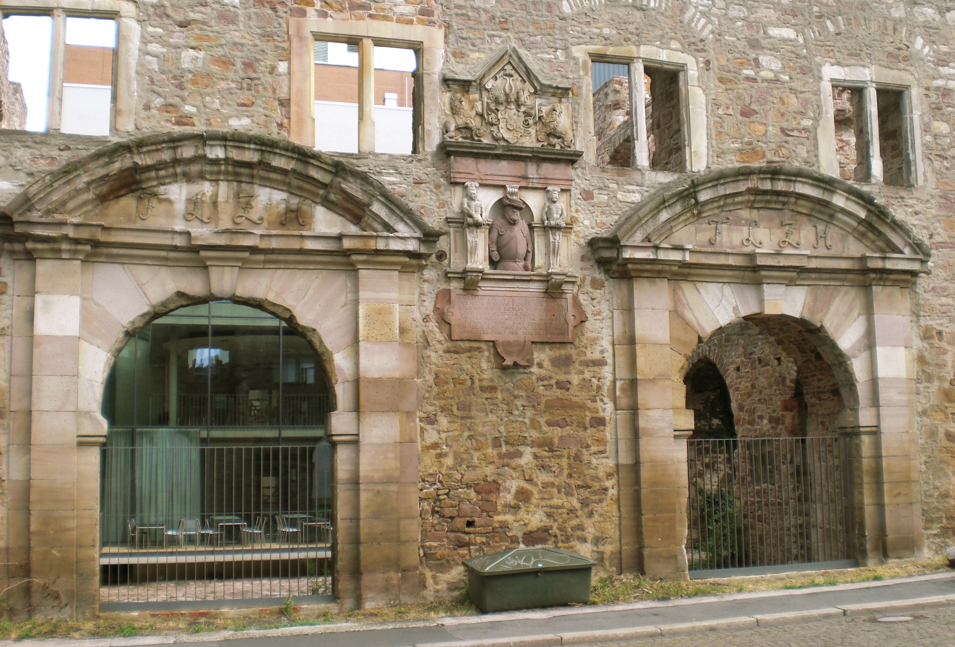 Bauschmuck am Kasseler Zeughaus